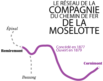 Carte du réseau de la compagnie du chemin de fer de la Moselotte (1877-1882), dessinée par moi-même pour l'article éponyme.